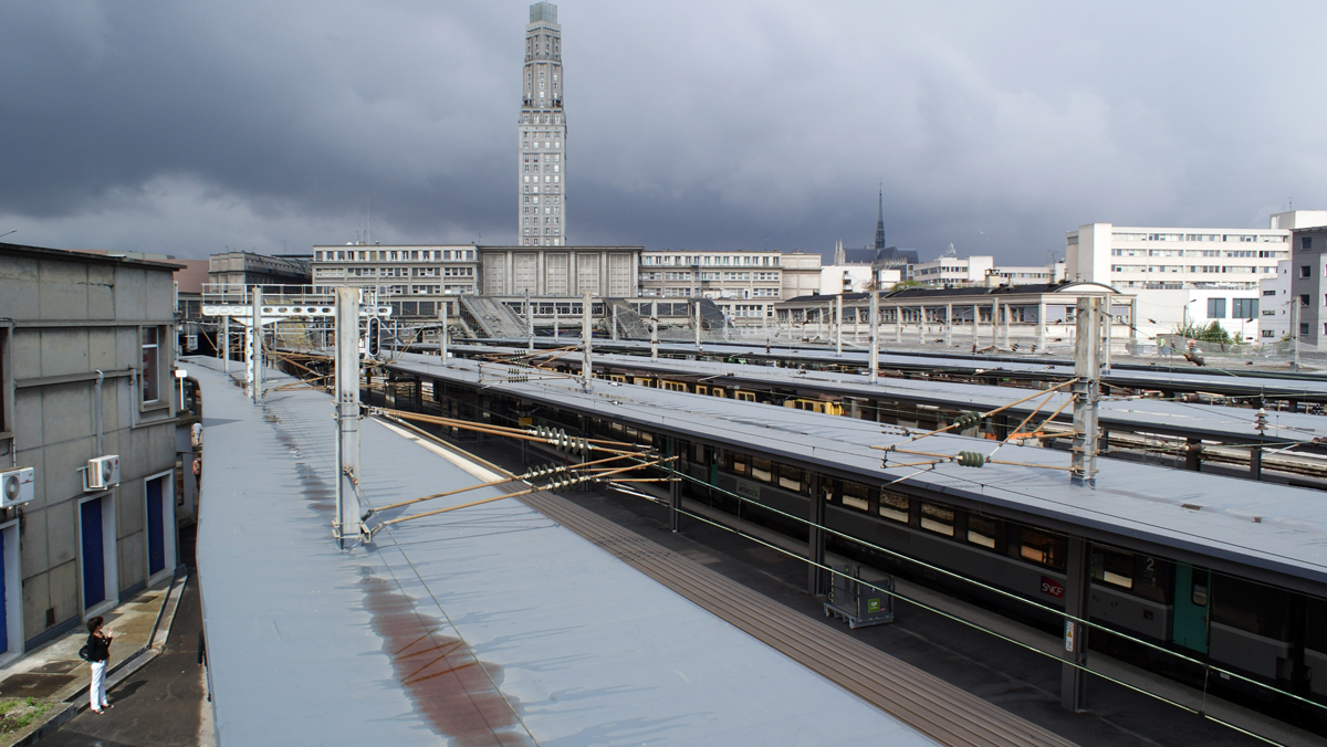 La gare vue par dessus les marquises (rénové)